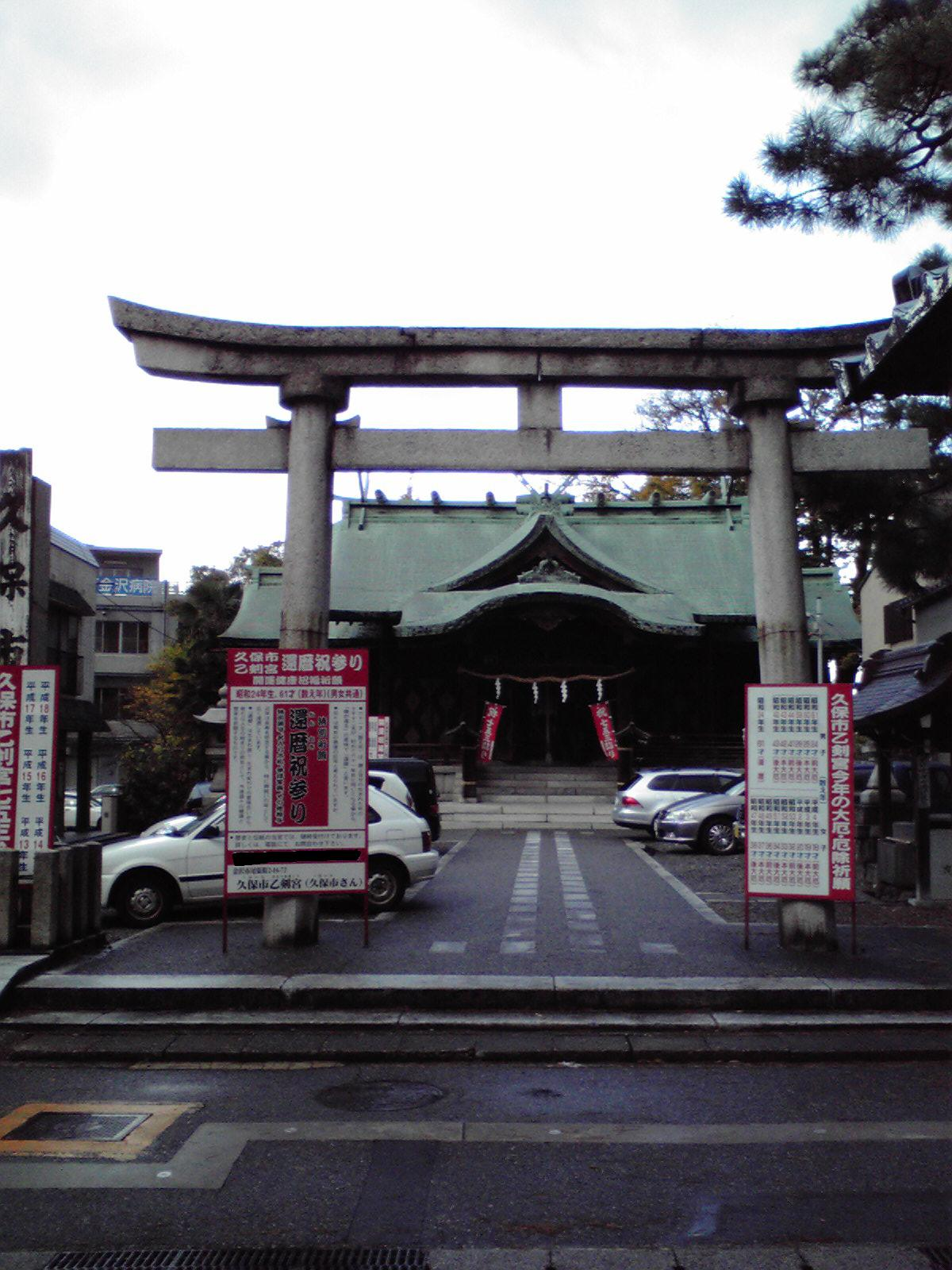 石川県金沢市尾山町にある久保市乙剣宮の写真。